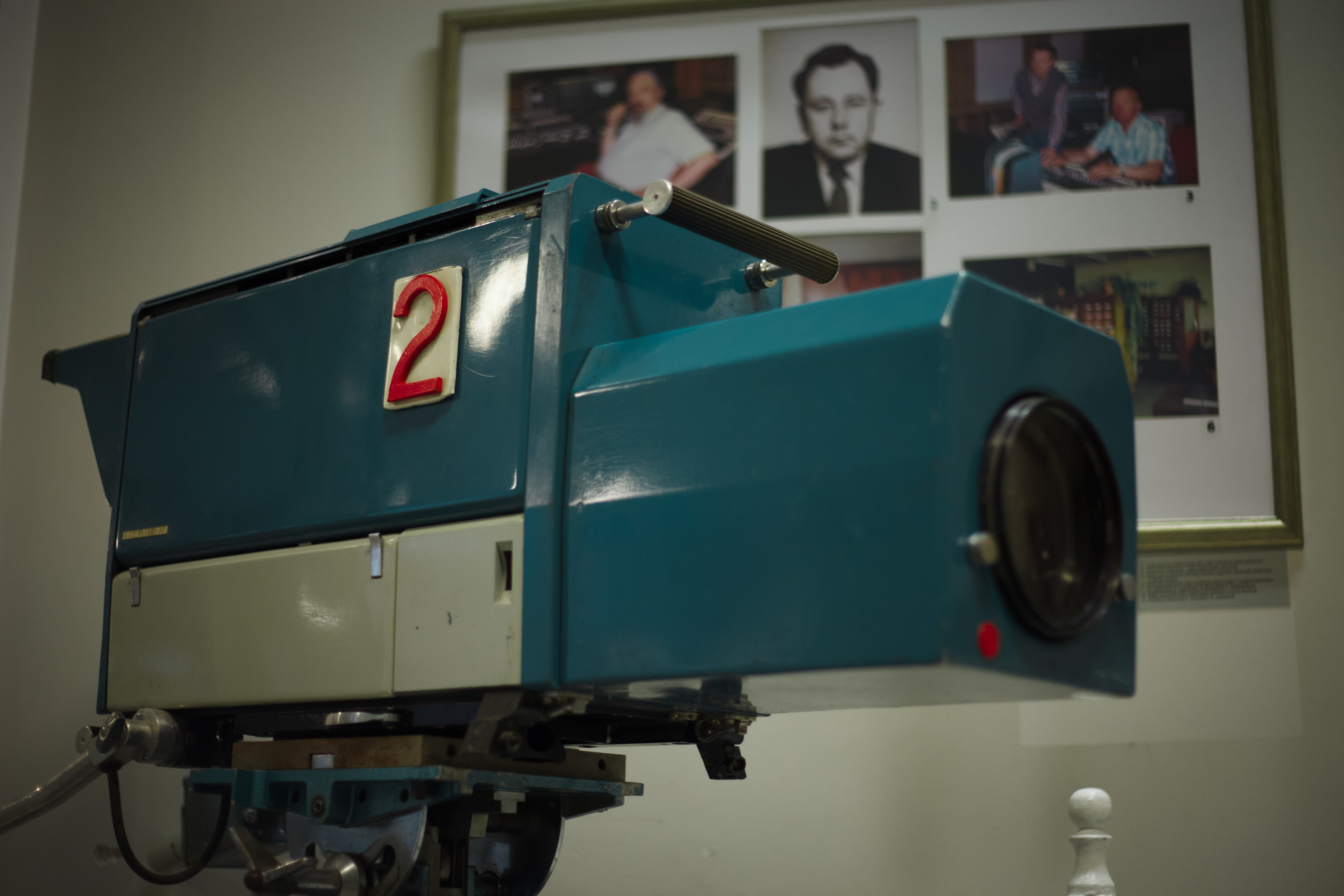 Erwin Verbruggen